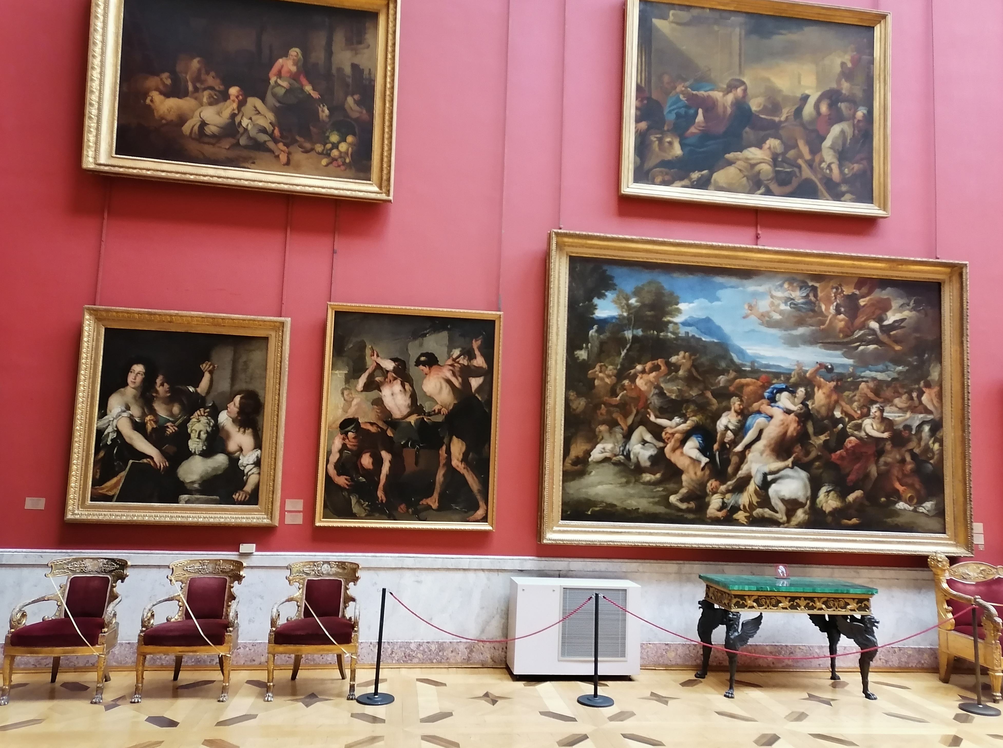 Новый Эрмитаж, зал 238 - Верхний ряд: Франческо Лондонио "Крестьянская семья", Лука Джордано "Изгнание торгующих из храма". Нижний ряд: Бернардо Строцци "Аллегория искусств", Лука Джордано "Кузница Вулкана", его же "Битва лапифов с кентаврами"